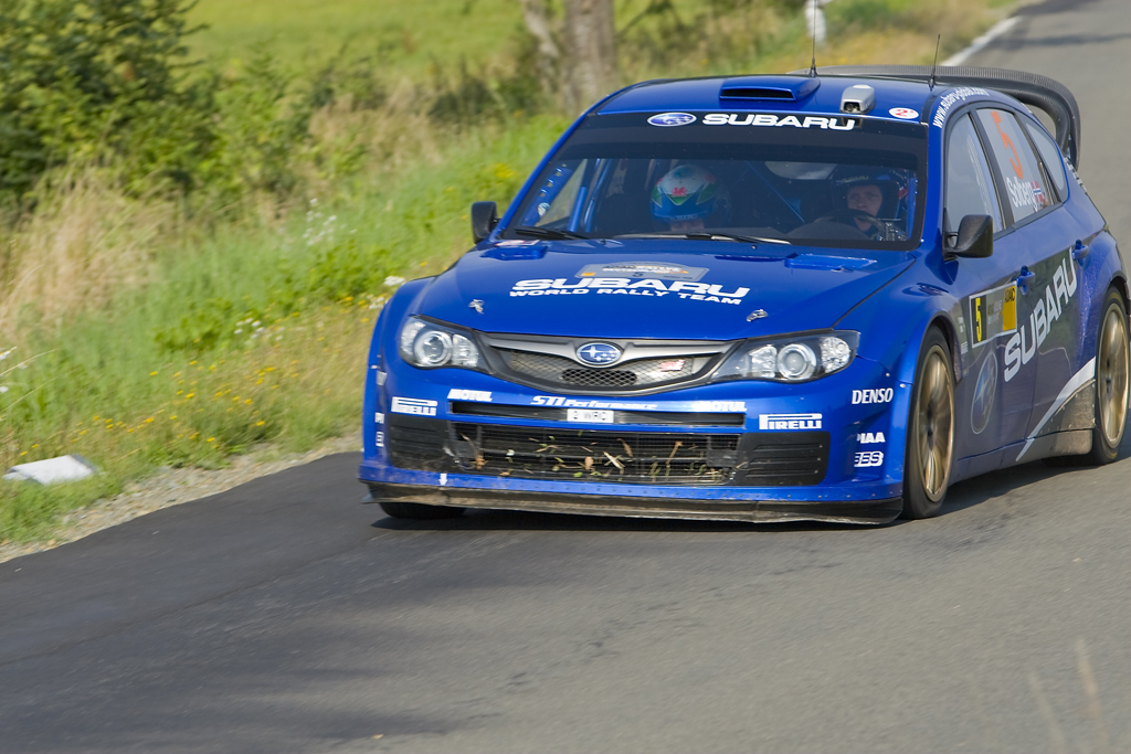 Petter Solberg driving his Subaru Impreza WRC2008 at the 2008 Rallye Deutschland.